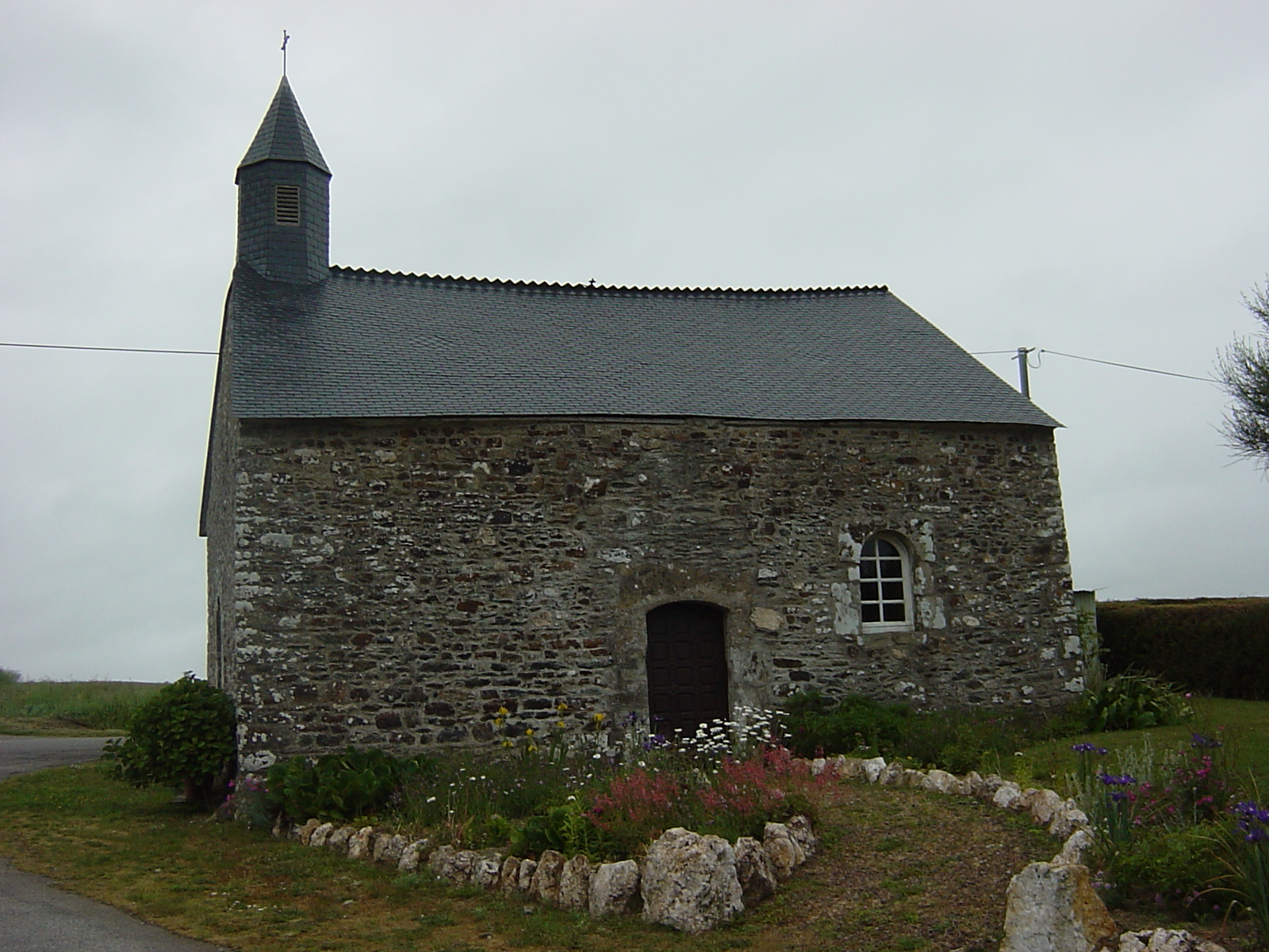 Chapelle de Saint Sébastien. chapelle à coté de la segnieurie Peeer situé à 100 Metres lieu dit Saint sebastien 56120 la grée Saint laurent, Morbihan France